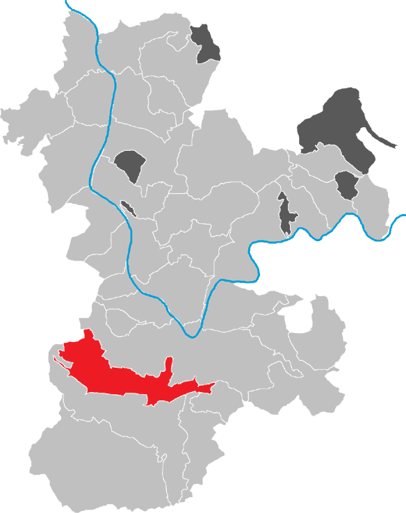 Karte von Weilbach im Kreis Miltenberg, Bayern, Deutschland.